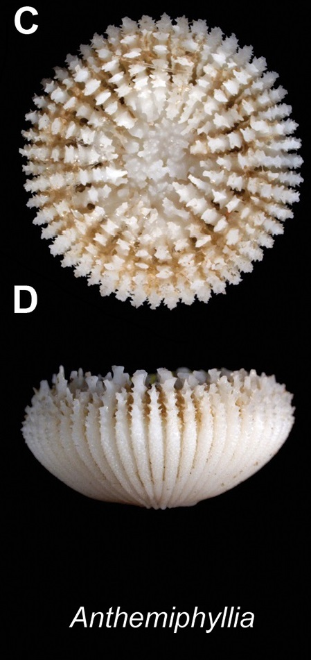 Recorte de imagen de archivo Commons ZooKeys- 227-001-018g